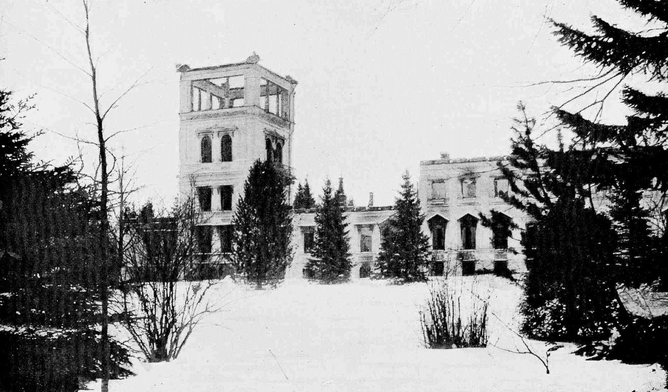 Vana-Gulbene mõisa peahoone pärast 1905. aasta põlengut.